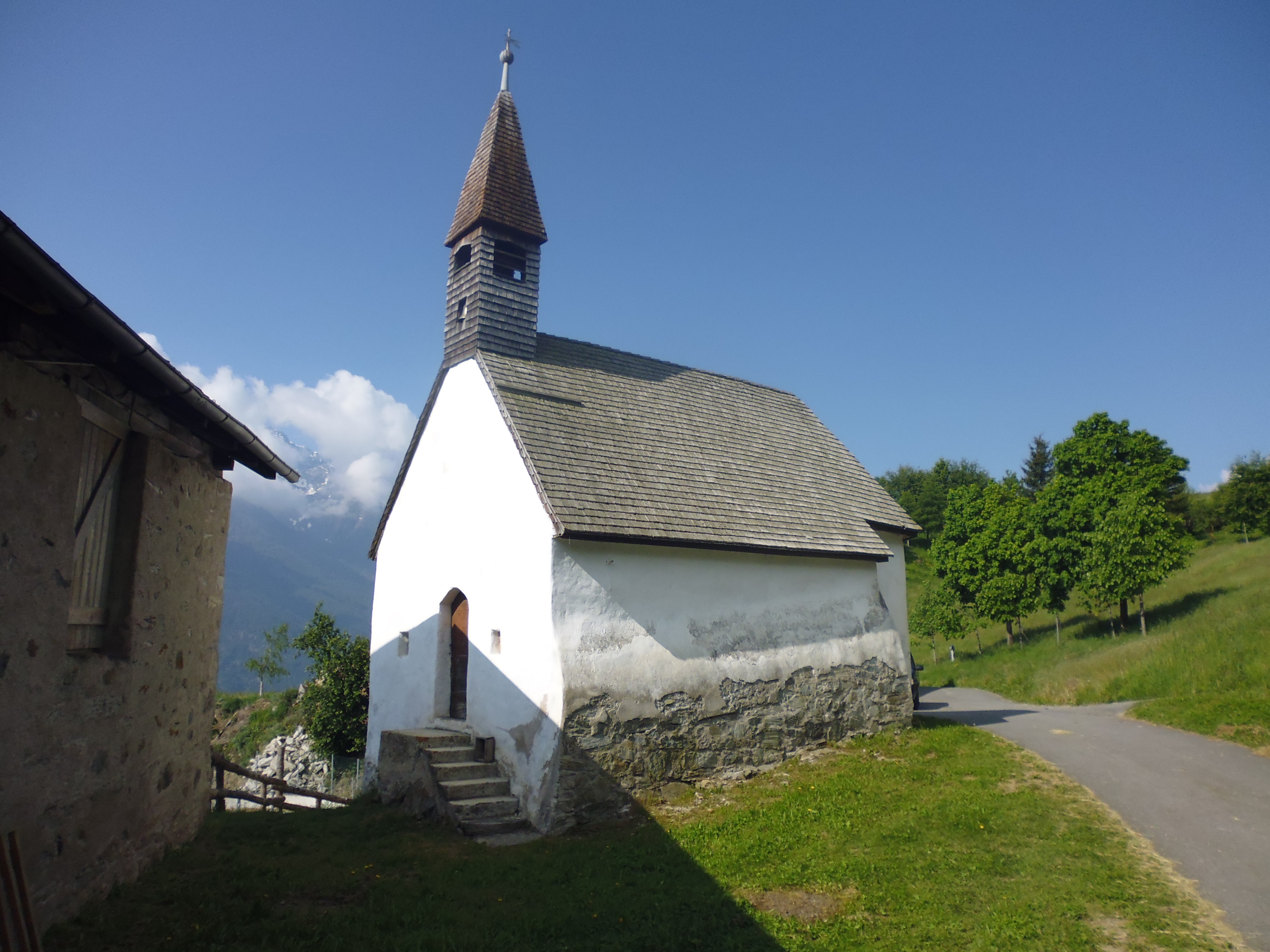 Kapelle des Untertröghofs in Allitz (Laas)